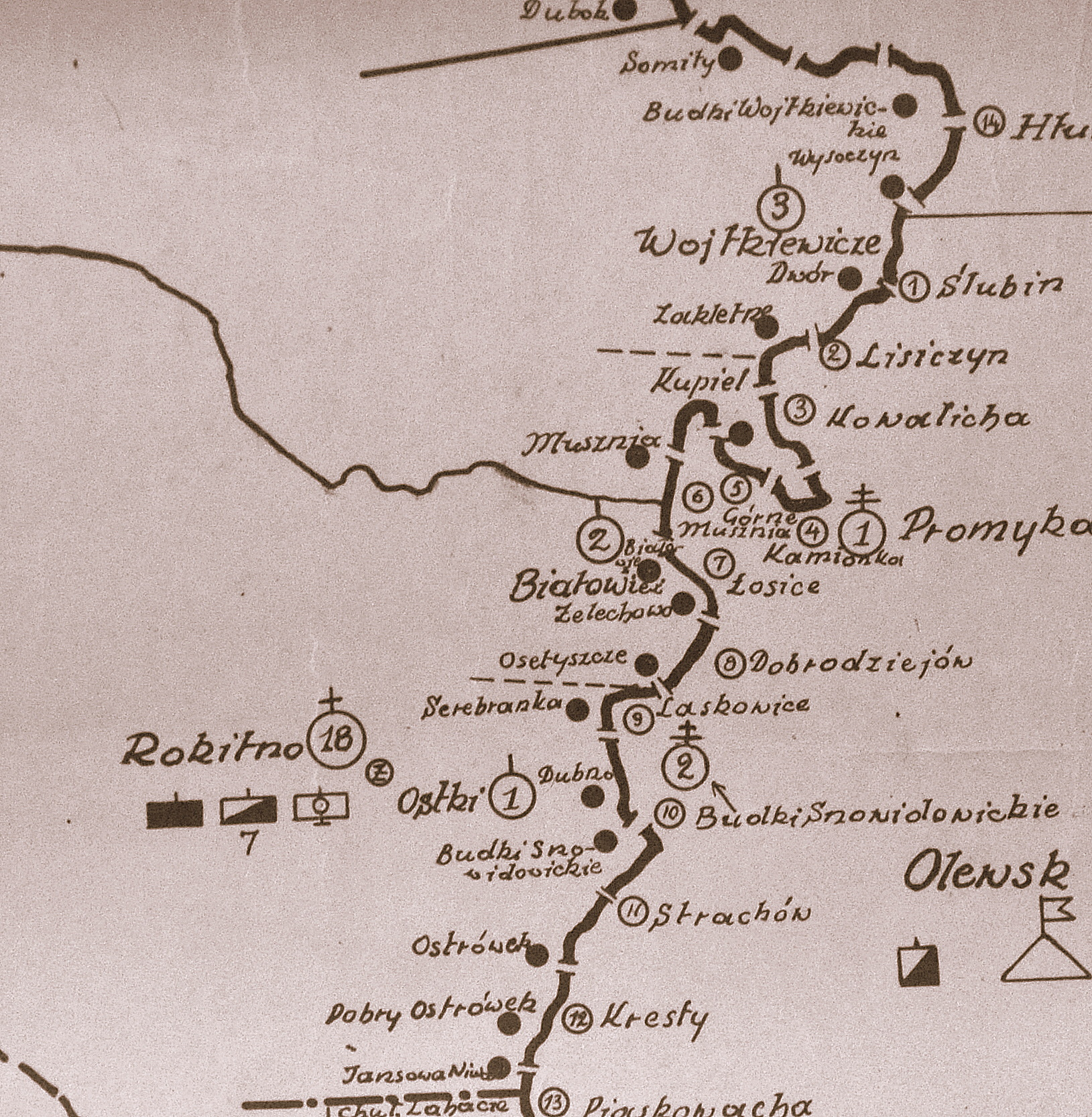 Szkic rozmieszczenia batalionu KOP Rokitno w 1931